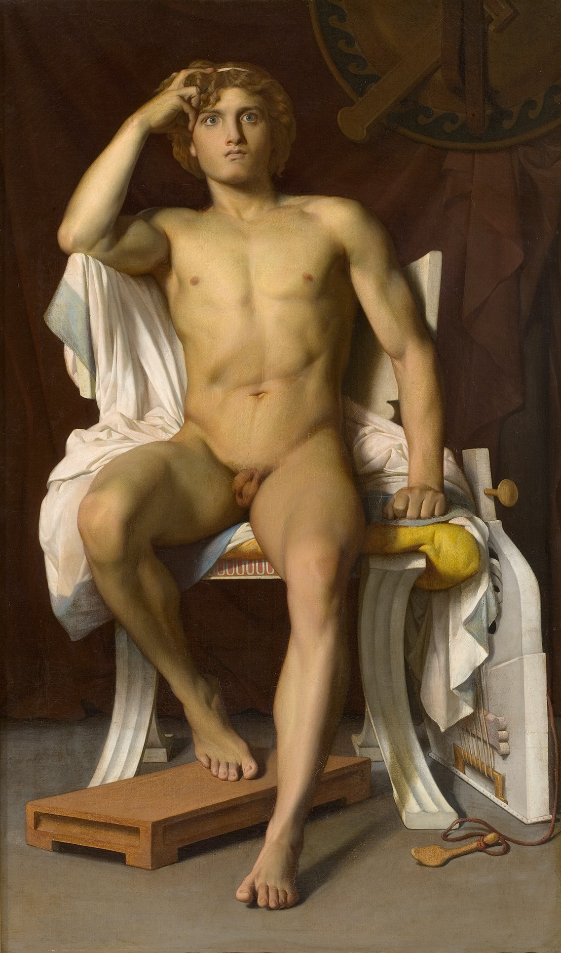 Furieux d'avoir été dépossédé de sa favorite par Agamemnon, Achille se retire du combat, compromettant la victoire des Grecs dans la guerre de Troie.